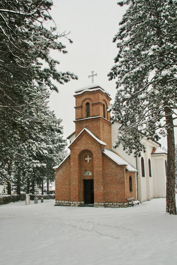 Српски (ћирилица): Црква Светог Архангела Гаврила